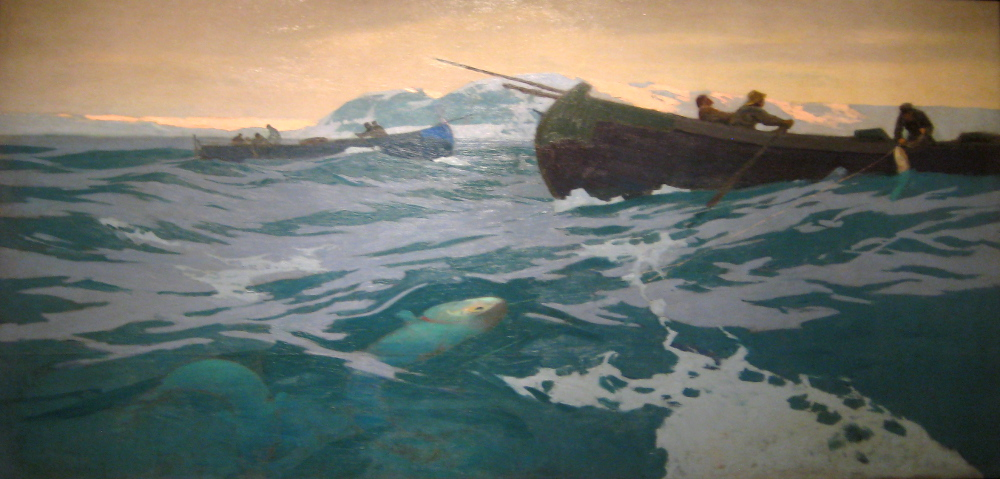 К. Коровин. "Ловля рыбы". ГТГ